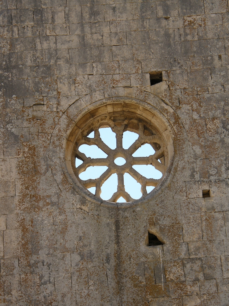 S. Maria di Cartiganano Bussi sul Tirino